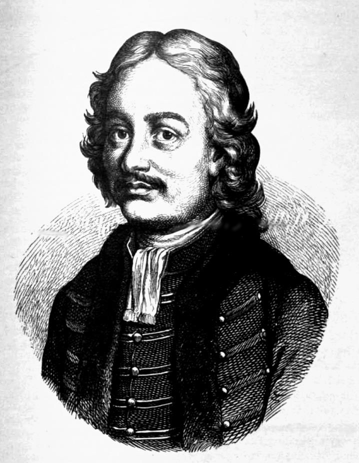 Gyöngyösi István (1629–1704) költő, jogász (Vasárnapi Ujság, 1858. november 7.)